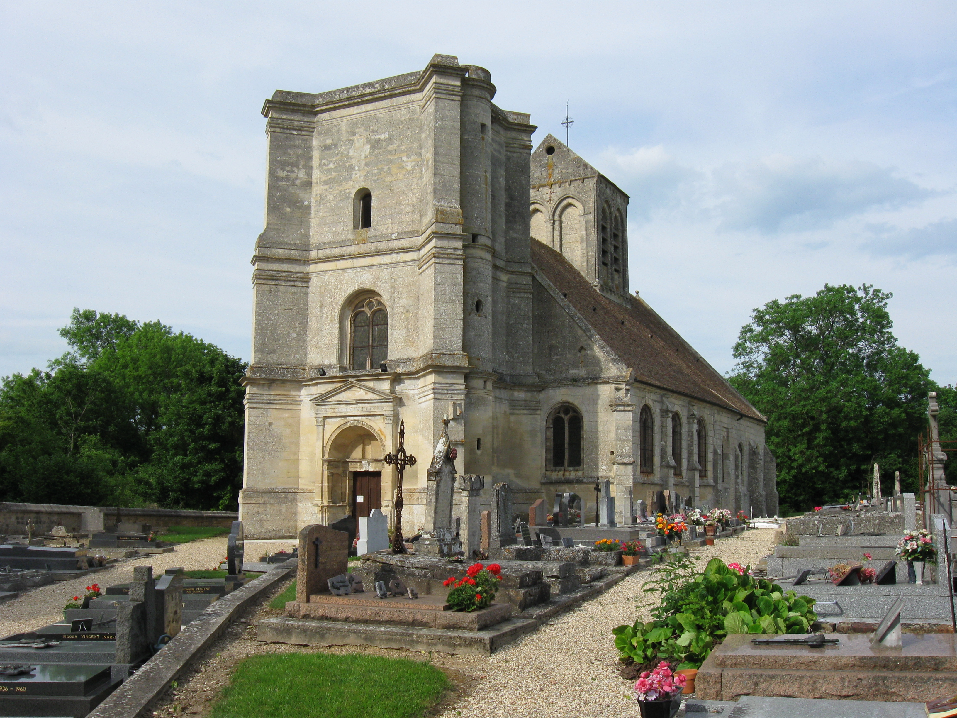 Église Saint-Quentin de Nucourt (département du Val-d'Oise, région Île-de-France)